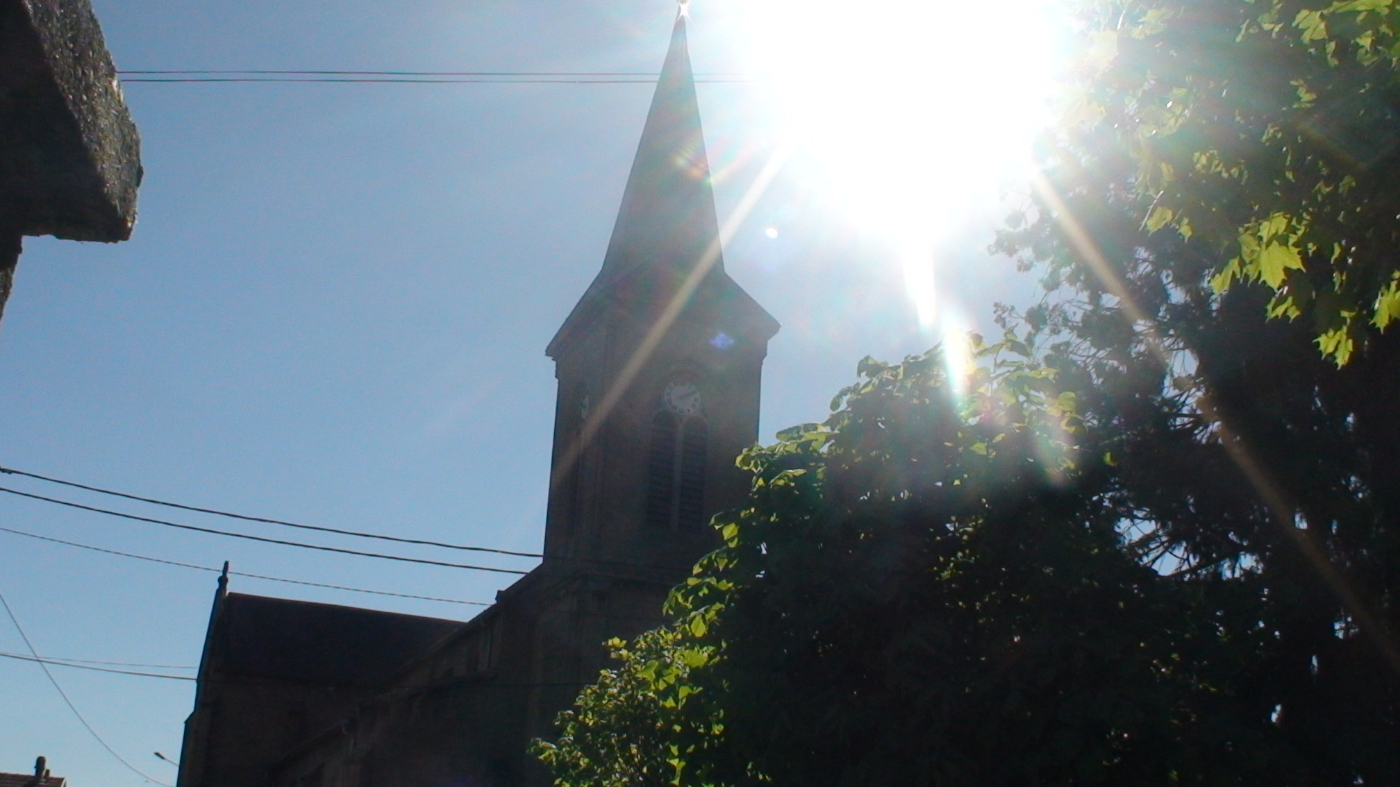 Photo de l'Eglise de Moineville prise depuis l'école